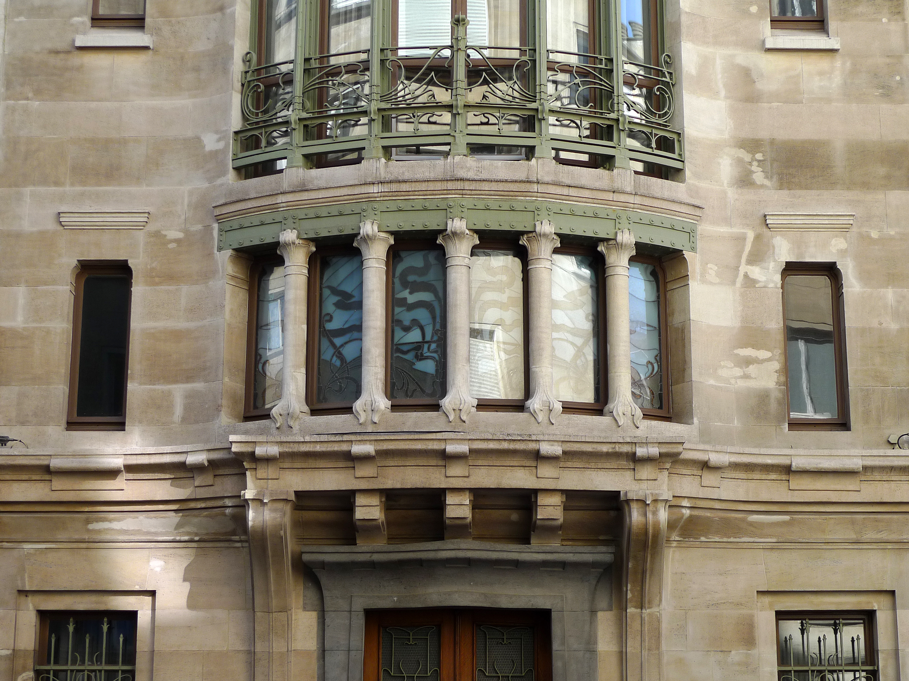 Detail of Hôtel Tassel (Victor Horta 1893) - rue Paul-Emile Jansonstraat - Elsene / Ixelles - Brussels (Belgium)